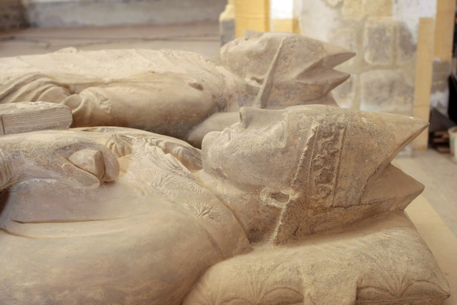 Tombeaux de saint Mayeul et saint Odilon, abbés de Cluny - Église prieurale de Souvigny (Allier-France)